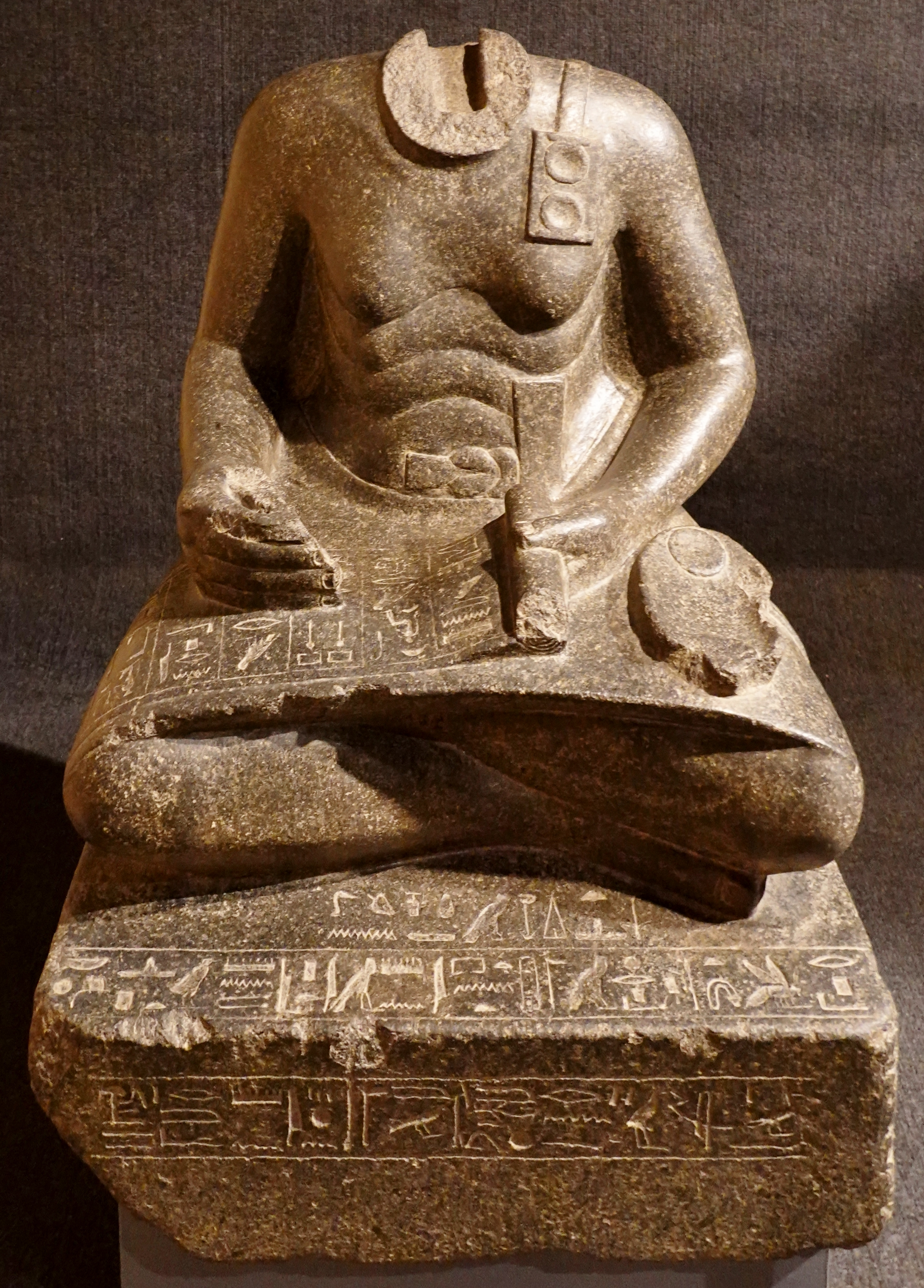 Statue des Schatzmeisters und Wesirs Mentuhotep unter Sesostris I. (Granit, 12. Dynastie), gefunden im Karnak-Tempel, ausgestellt im Luxor-Museum, Ägypten